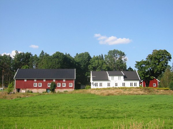 Gården Frostemyr på Vatnestrøm. Bildet er tatt ca 2004.